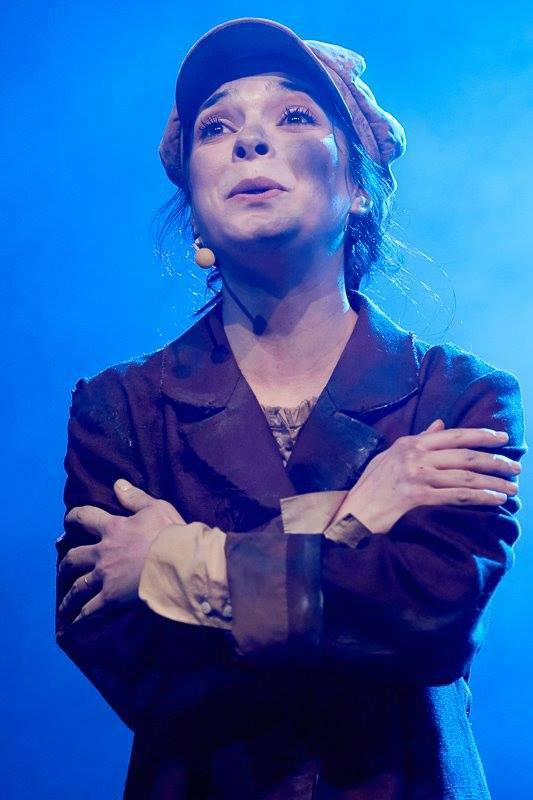 Vanessa Cailhol dans le rôle d'Eponine dans Les Misérables en 2012